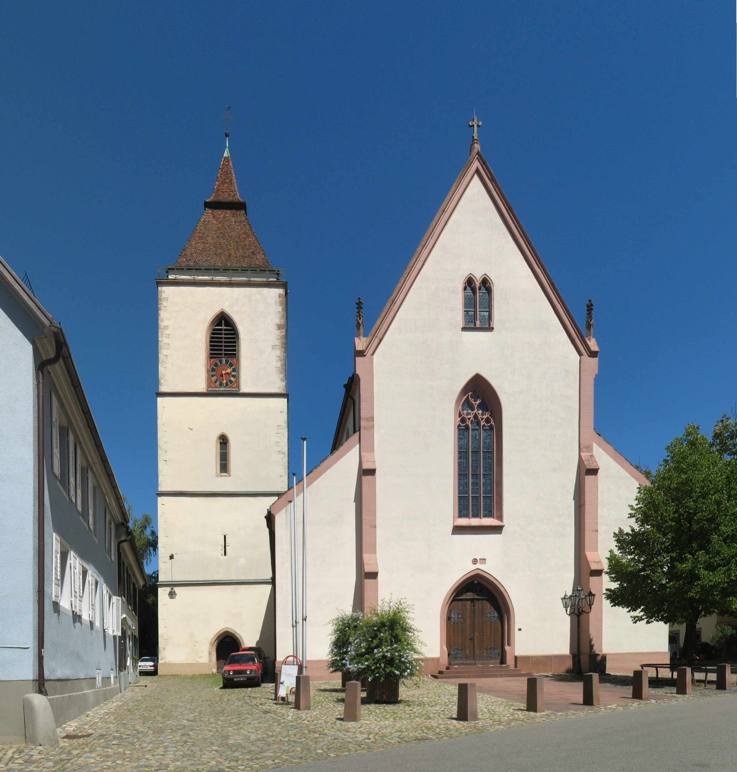 Kirche Sankt Martin in Staufen im Breisgau.